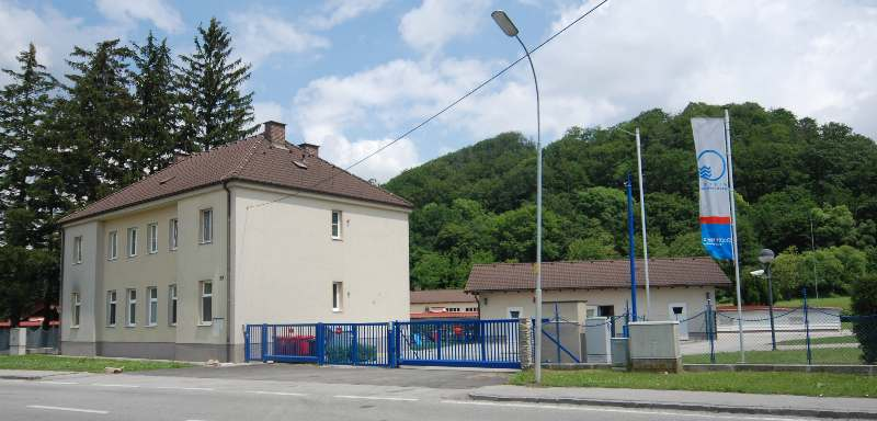 Das ehemalige Wientalwasserwerk der Stadt Wien – MA 31 Wasserwerke in Untertullnerbach (Niederösterreich)